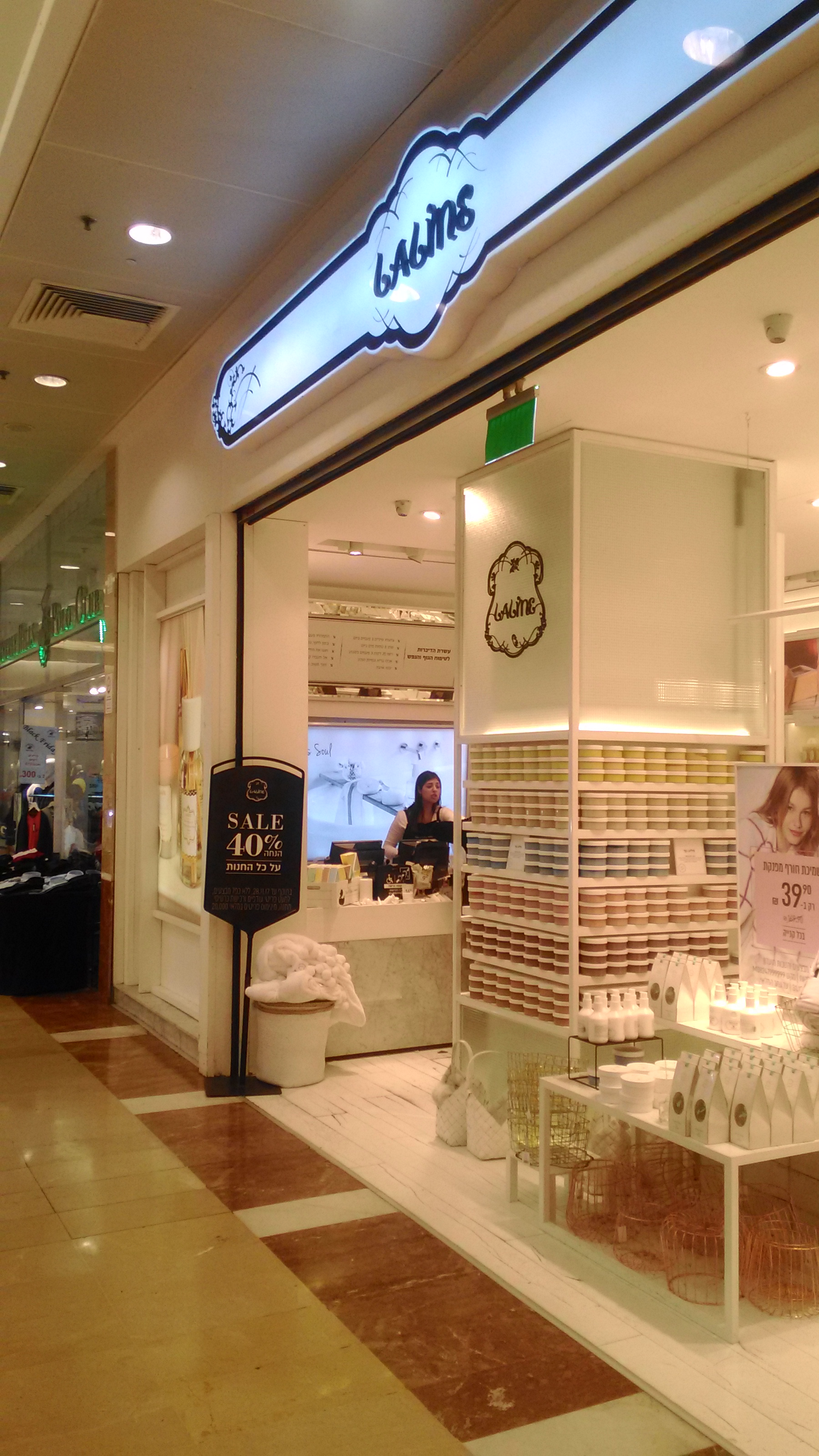 סניף ללין